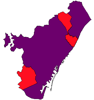 Municipios de la Comarca del Barcelonés por Alcaldías.